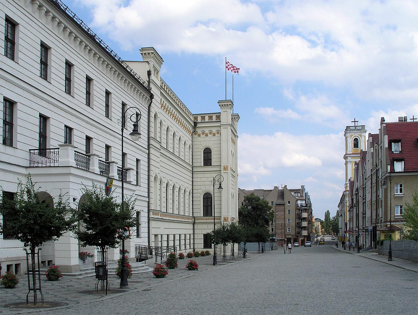 Plac przed ratuszem. Po prawej kiedyś była południowa pierzeja rynku. Na wprost widoczny kościół pw. Bożego Ciała. Popularne ujęcie przed wojną oraz a także